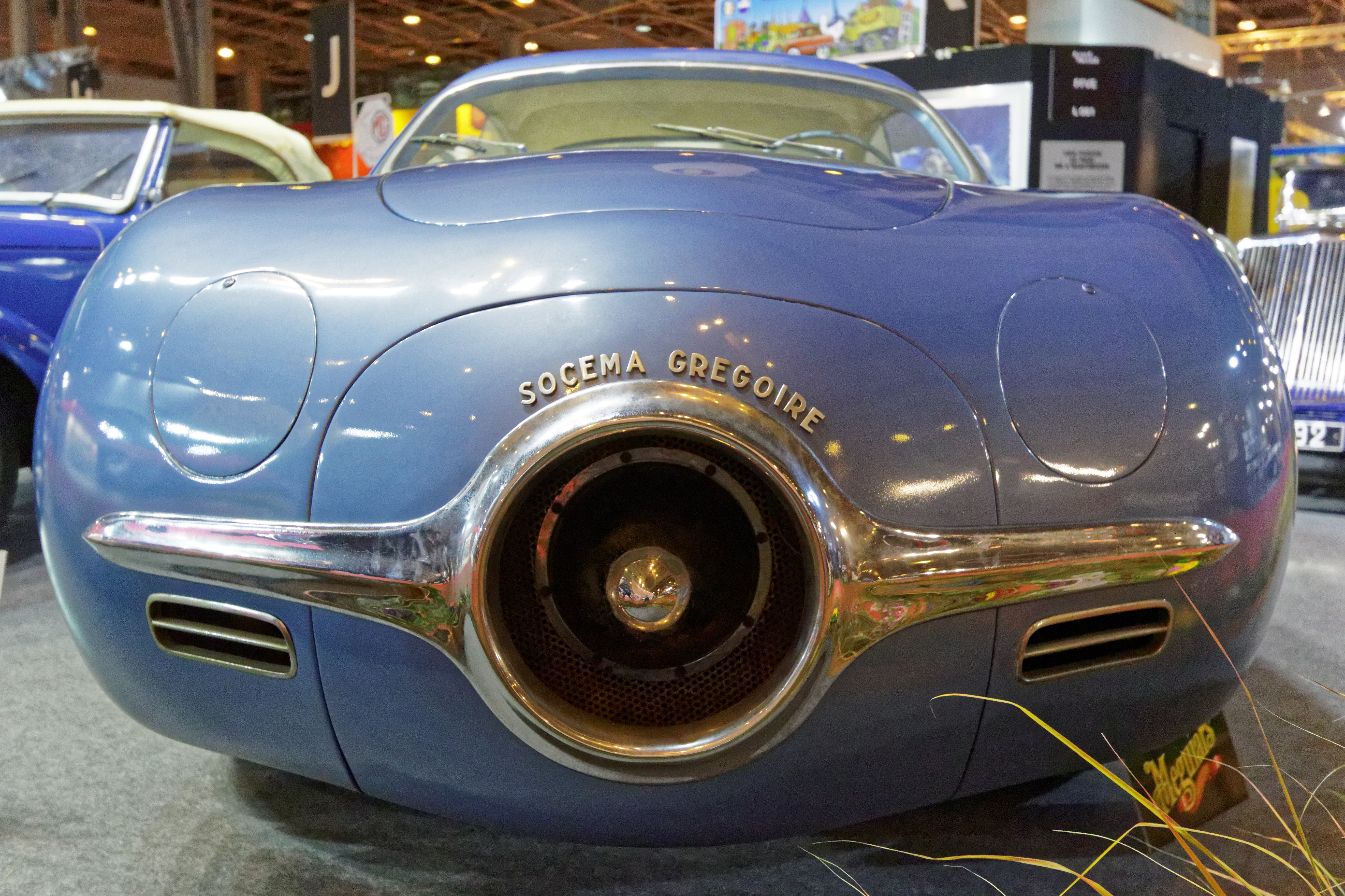 Une des voiture présentée lors du salon Rétromobile de Paris 2015